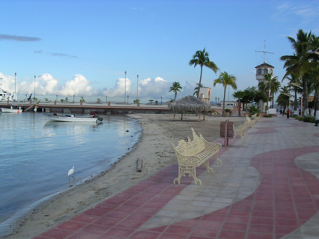 La Paz, Mexico